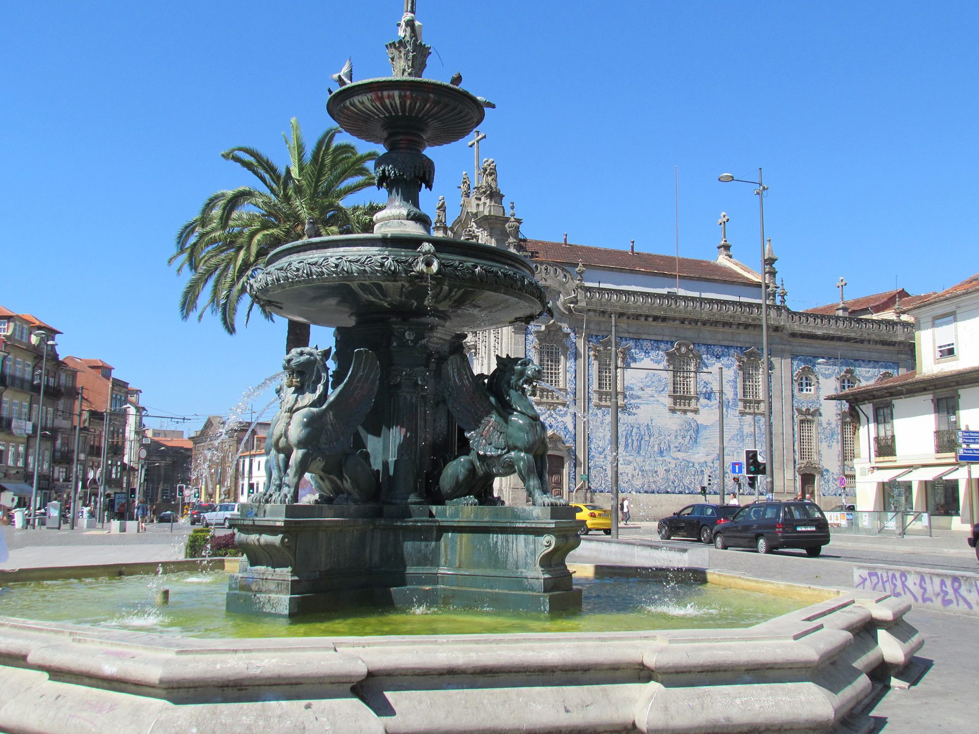 Porto